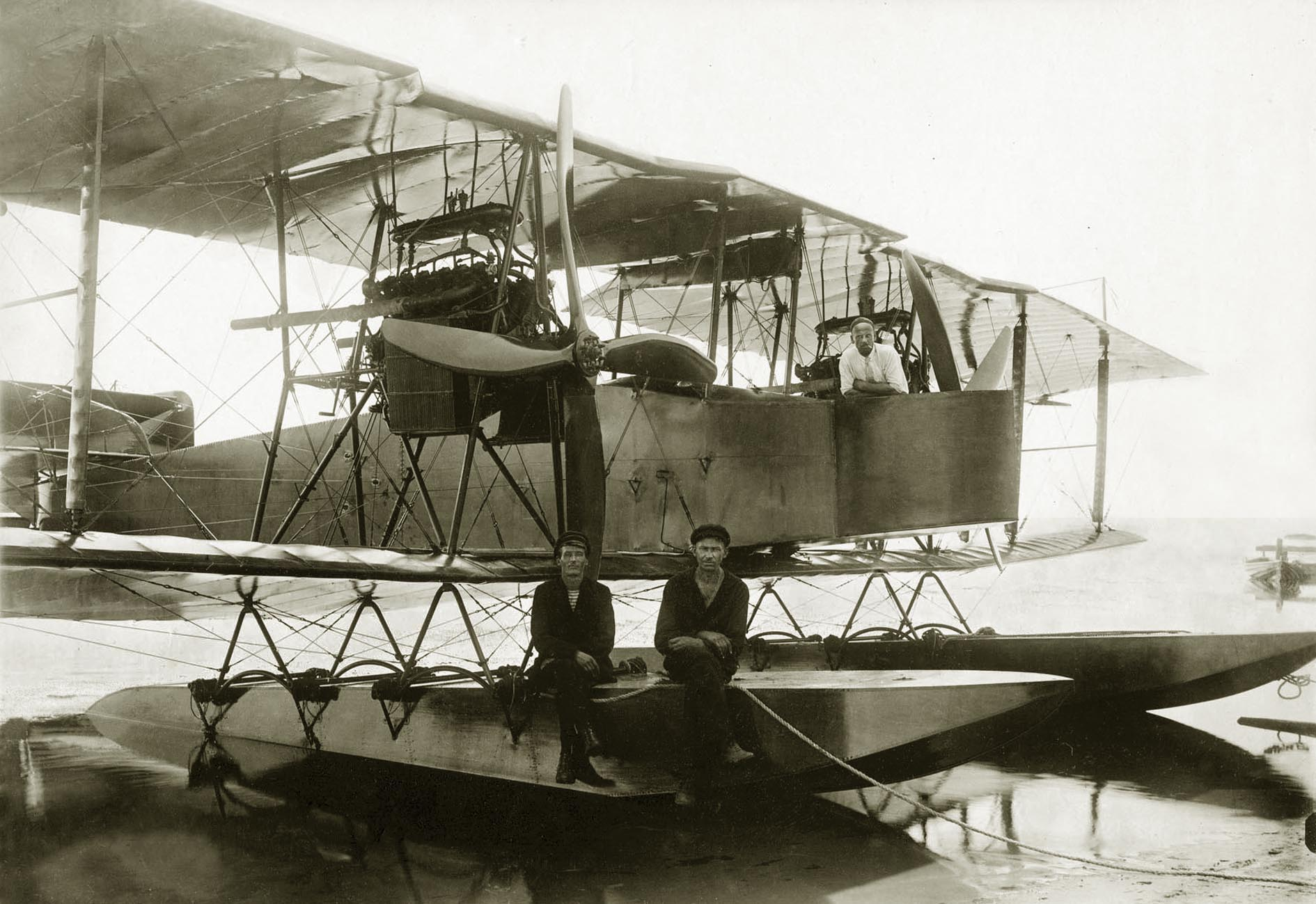 Гидроплан-торпедоносец ГАСН конструкции М. М. Шишмарёва и Д. П. Григоровича